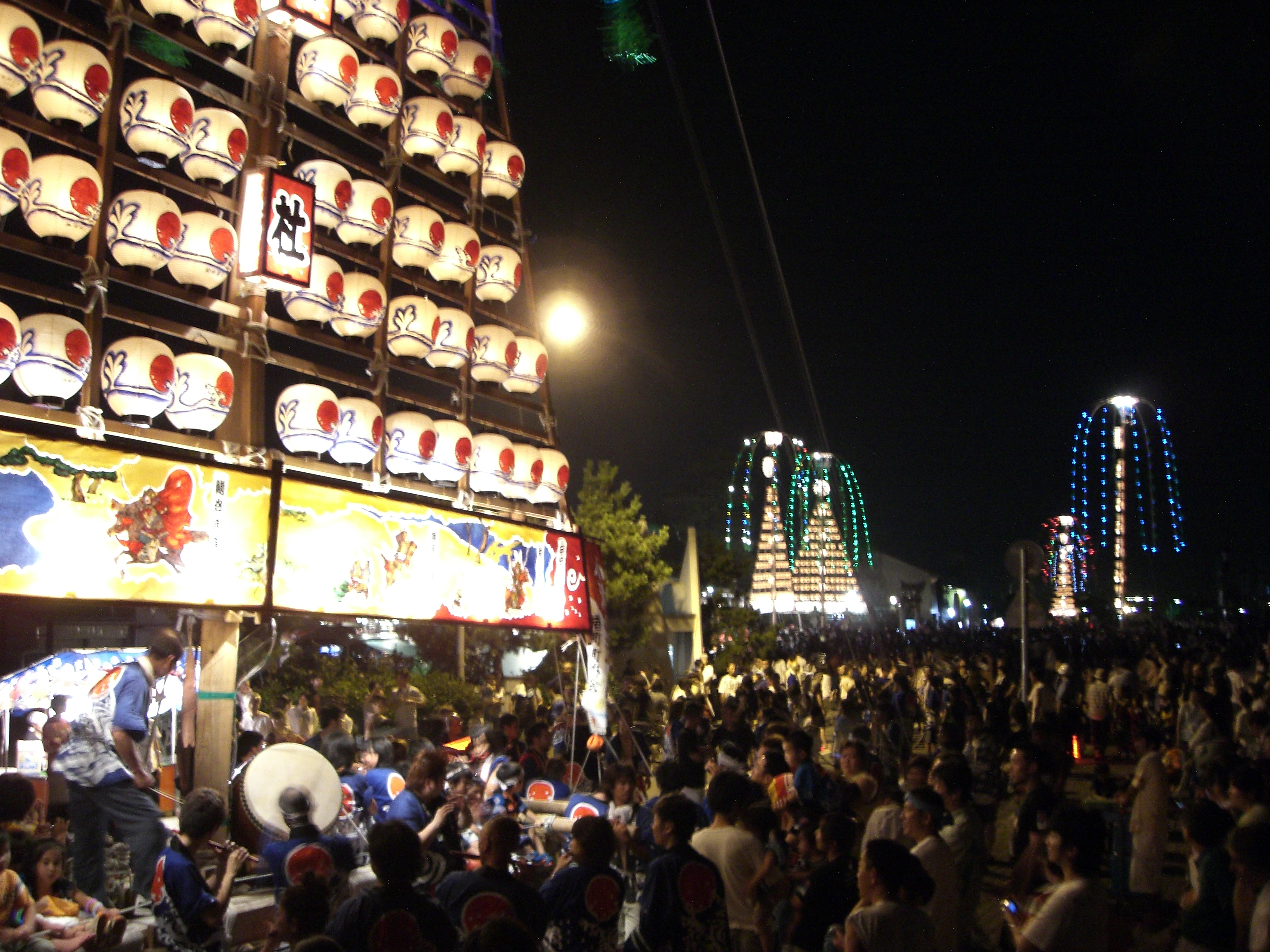 （たてもん祭りを個人撮影）